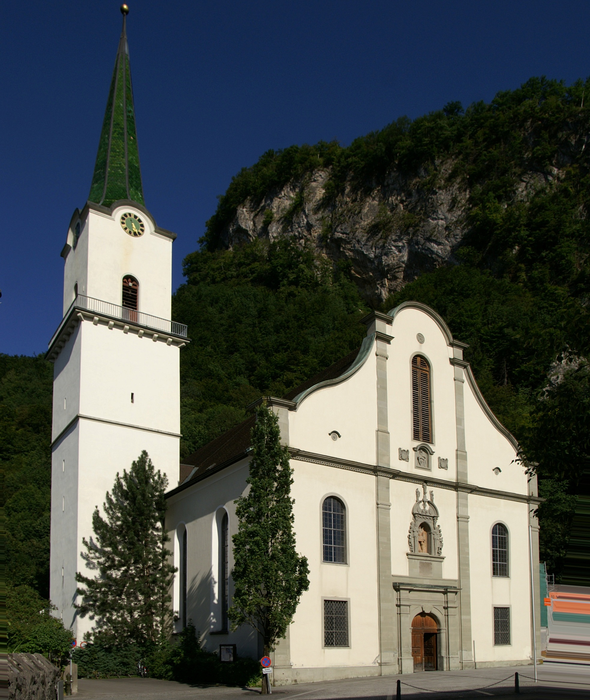 Stadtpfarrkirche St.Karl, 1797 erbaut in Hohenems , Vorarlberg